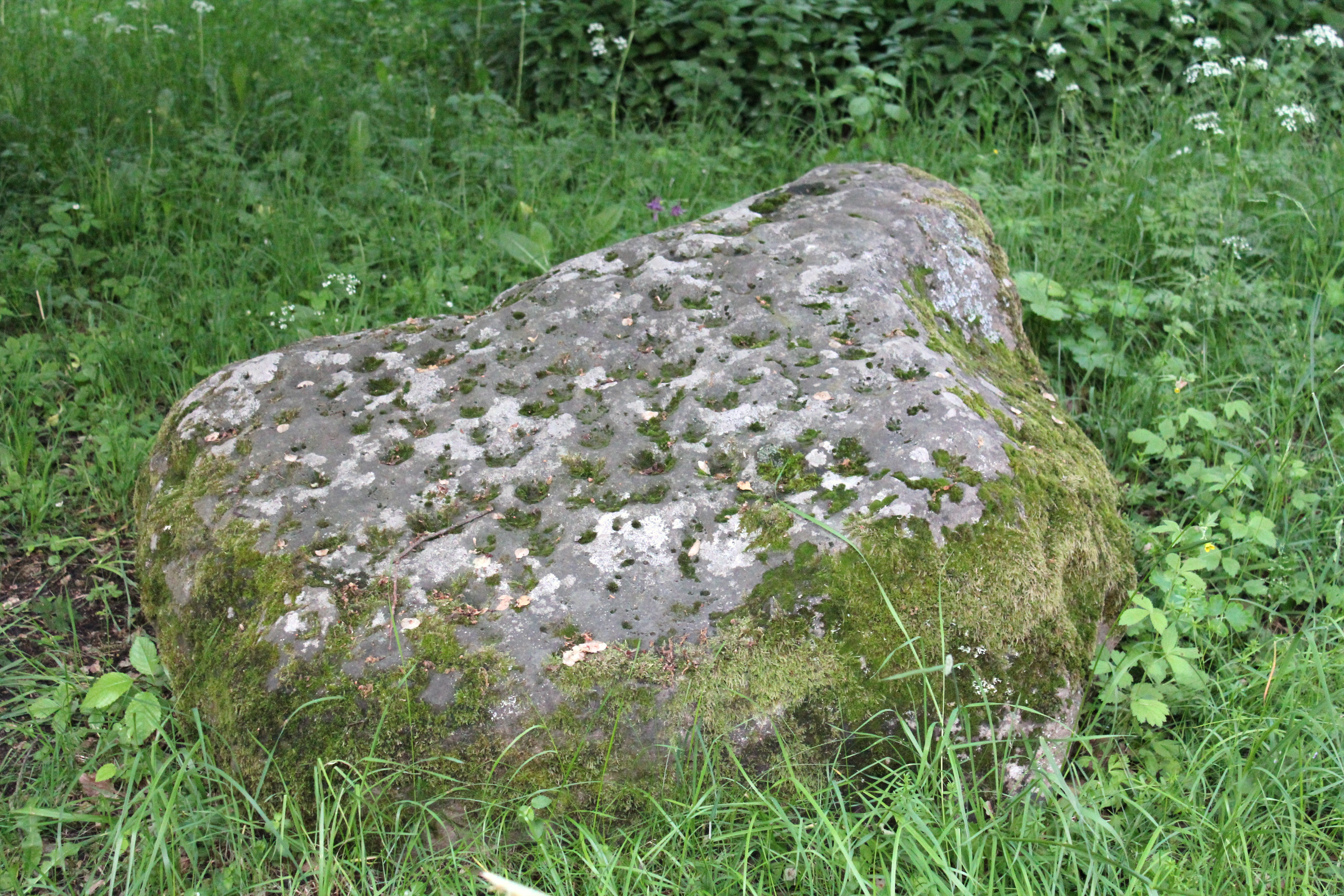 Skålgropssten vid Brännkyrka hembygdsgård.